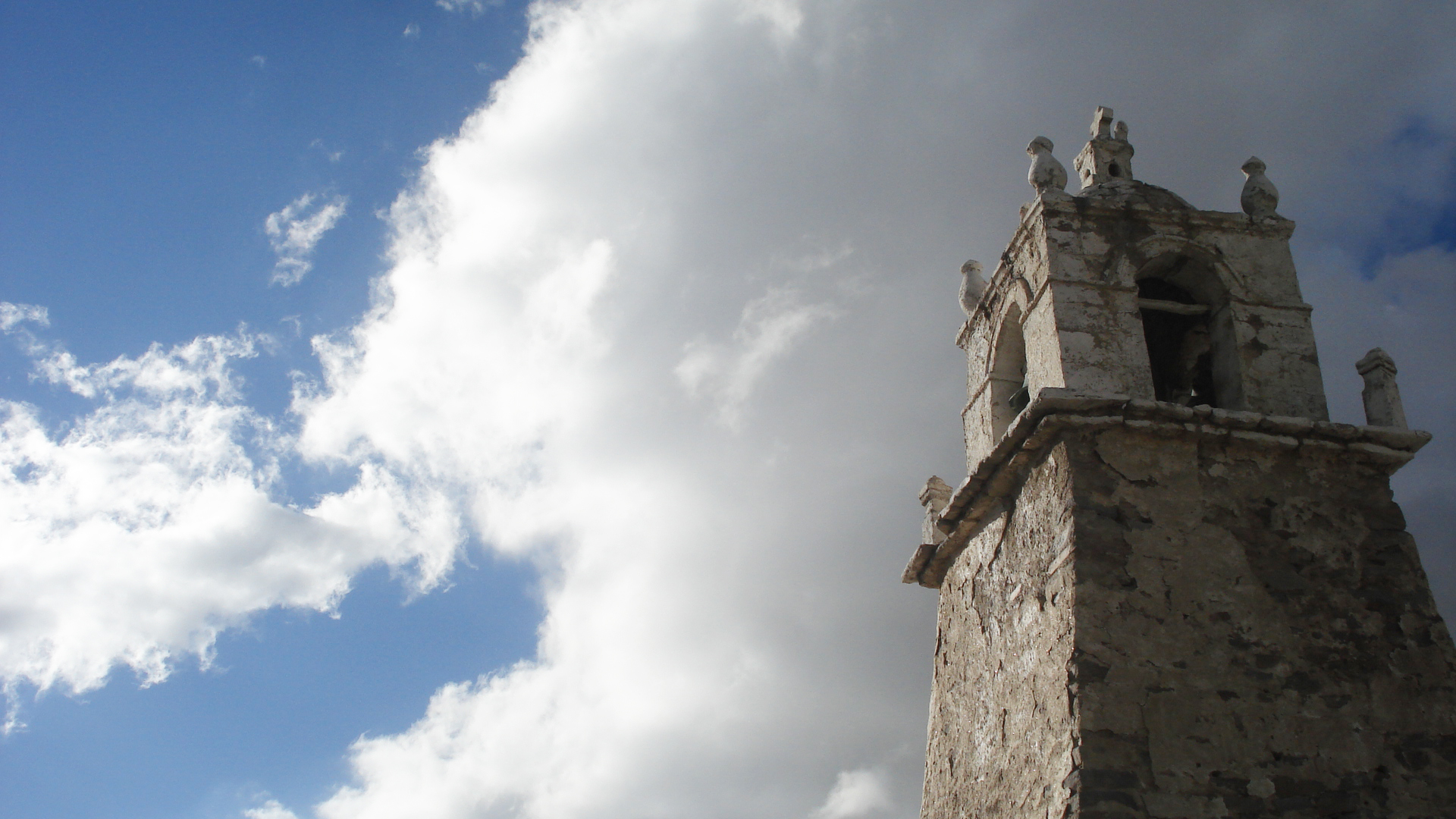 Iglesia de la Virgen de la Inmaculada Concepción de Guallatire This is a photo of a national monument in Chile: 2232